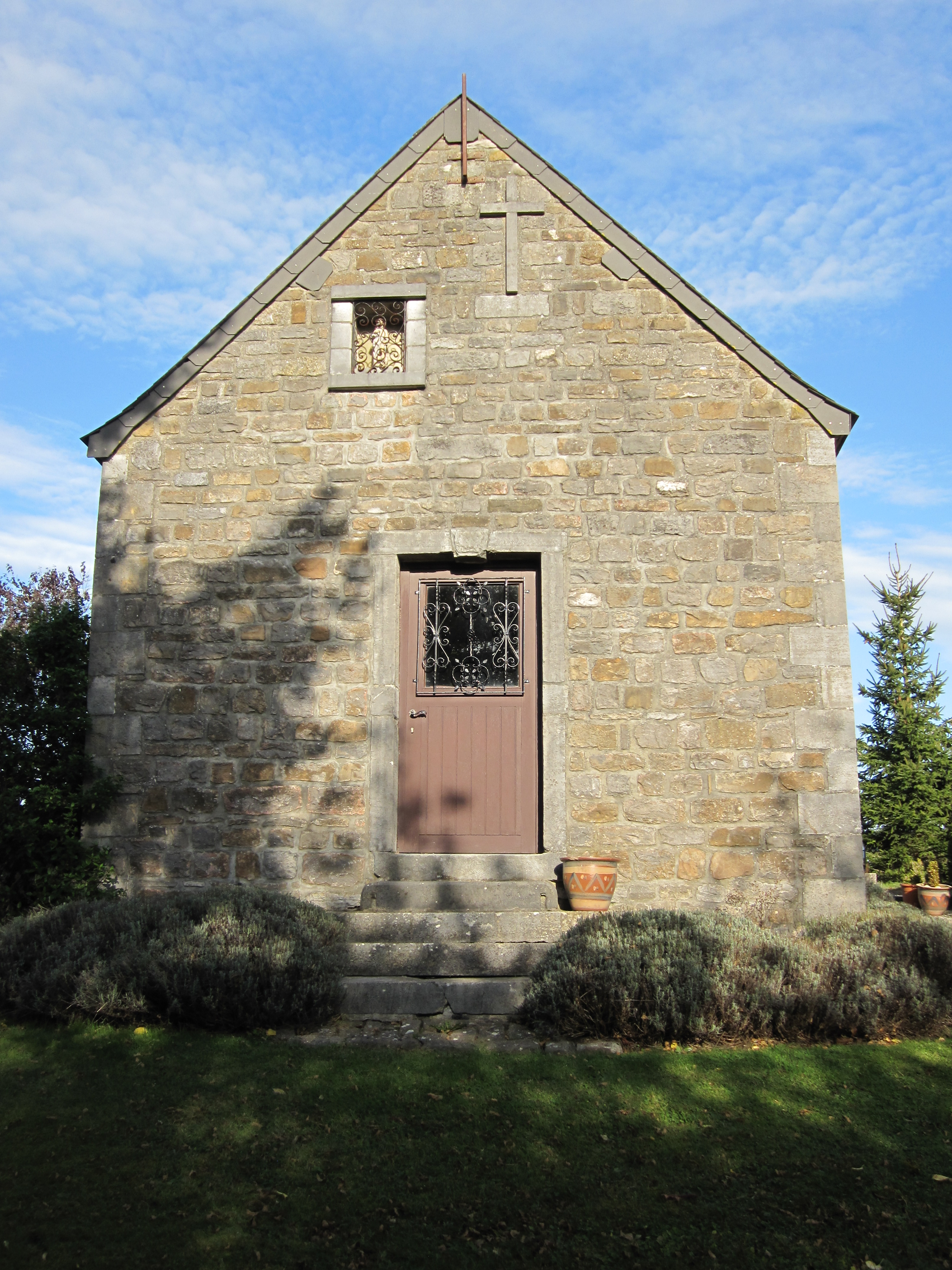 Chapelle dédiée à Notre-Dame, datée du XIXème siècle, sise derrière le n° 2 de la rue du Centre à Marenne.